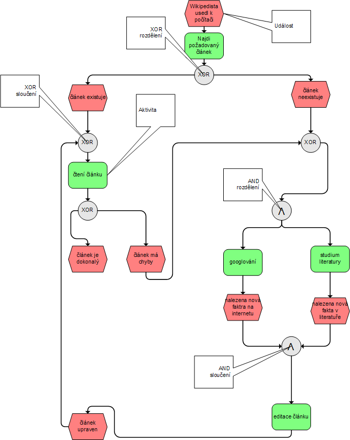 EPC diagram, který popisuje proces editace ve wikipedii